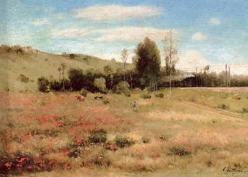 Antonín Chittussi: Na dráze orleánské